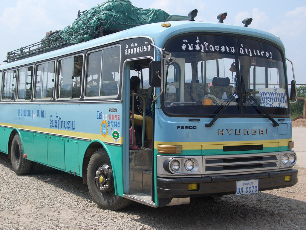 Hyundai FB500 bus, seen in Laos